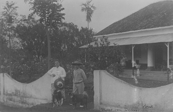 Foto. Eugenie Mertens met haar zoon Wim voor het vakantiehuis van Cornelis J.G. van Deun in Poenten